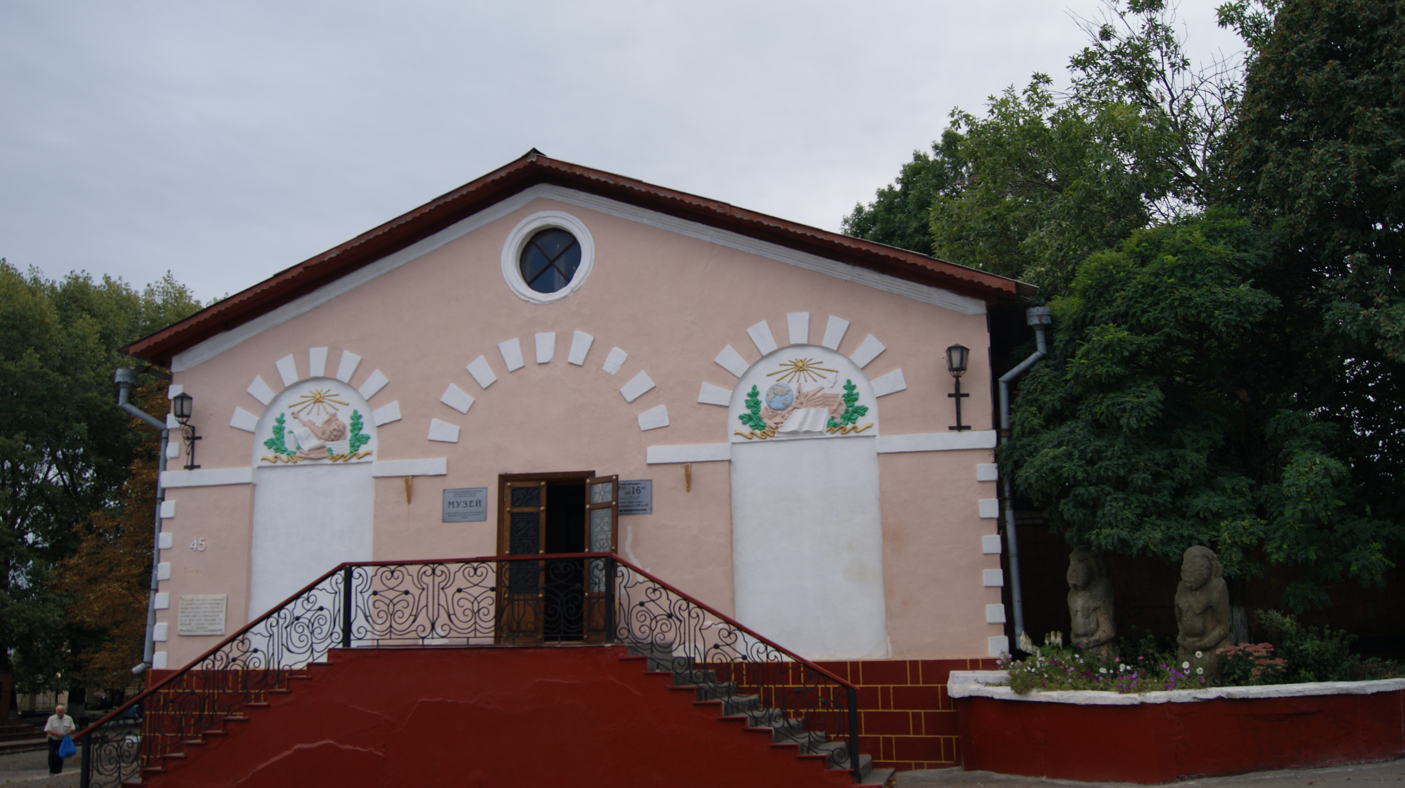 Будинок колишньої штейгерської школи. Нині Музей історії розвитку вугільної промисловості Лисичанського кам'яно-вугільного району.